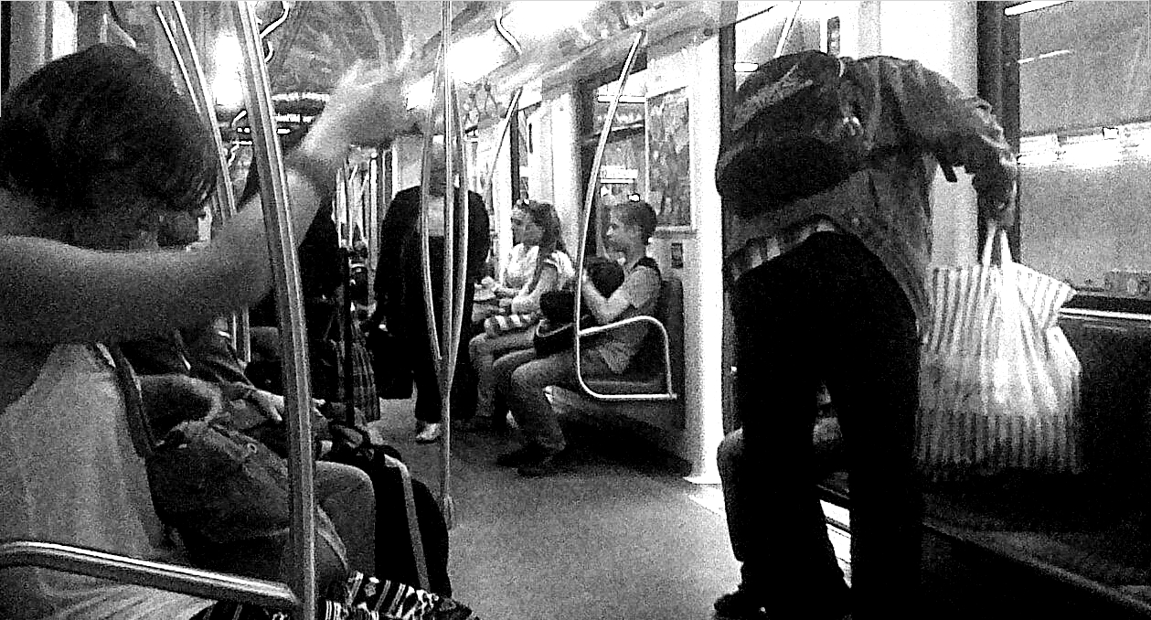 Négyes metro, Keleti